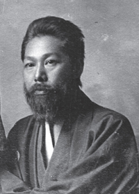 宮崎滔天 みやざきとうてん